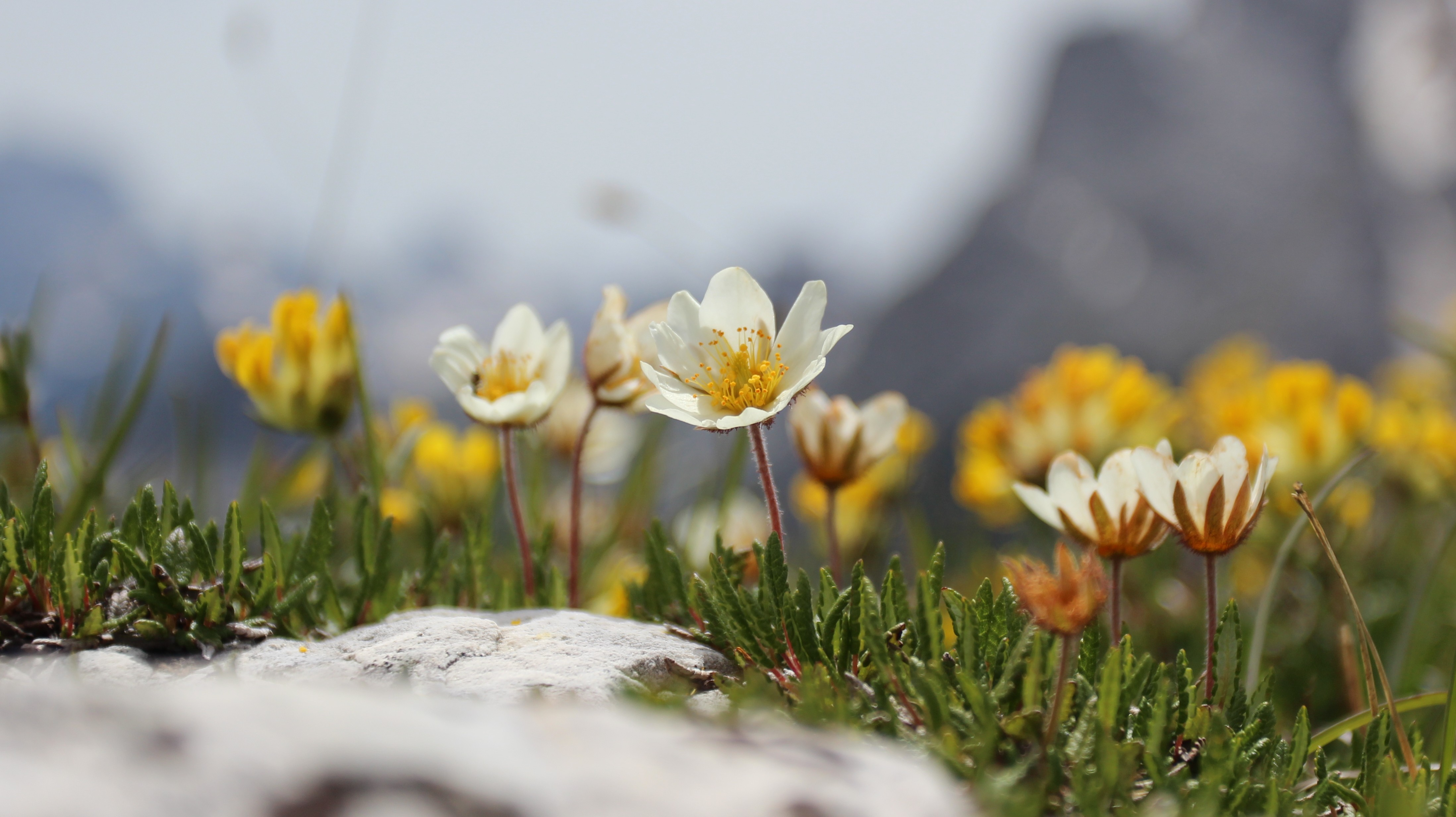 Weiße Silberwurz (Dryas octopetala)